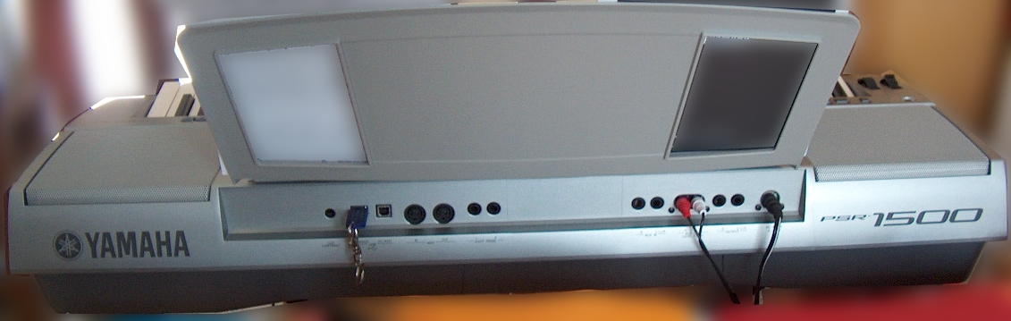 Ceci est une photographie de la face arrière d'un PSR 1500 de Yamaha. C'est avec ce Synthétiseur que SpeedyBoo réalise ses morceaux. Auteur : BELIARD Nicolas - Baptiste SpeedyBoo